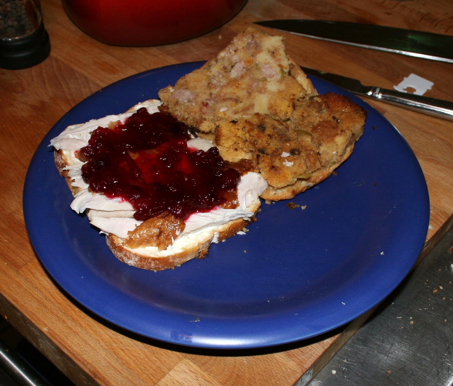 Open faced, delicious.